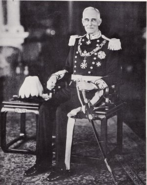 第18任香港總督金文泰爵士（1875 - 1947）督憲閣下。任期為1925.11 - 1930.2